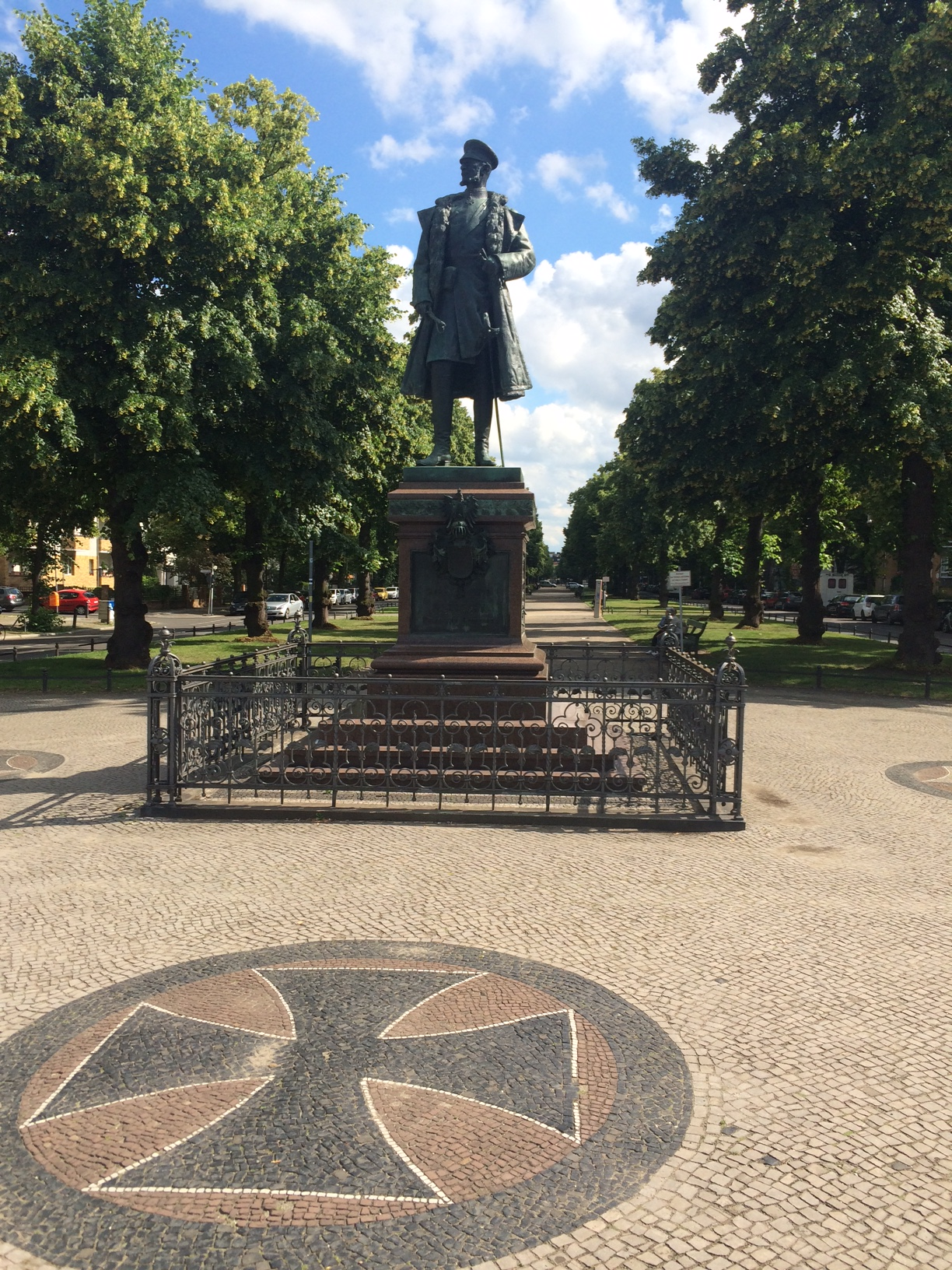 Памятник принцу Альбрехту в Берлине